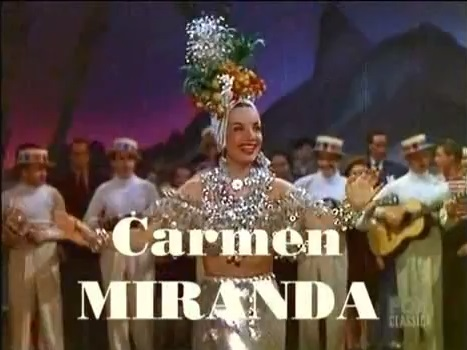 Imagem do trailer do filme That Night in Rio (1941). Os trailers dos filmes publicados antes de 1964 nos Estados Unidos são de domínio público.